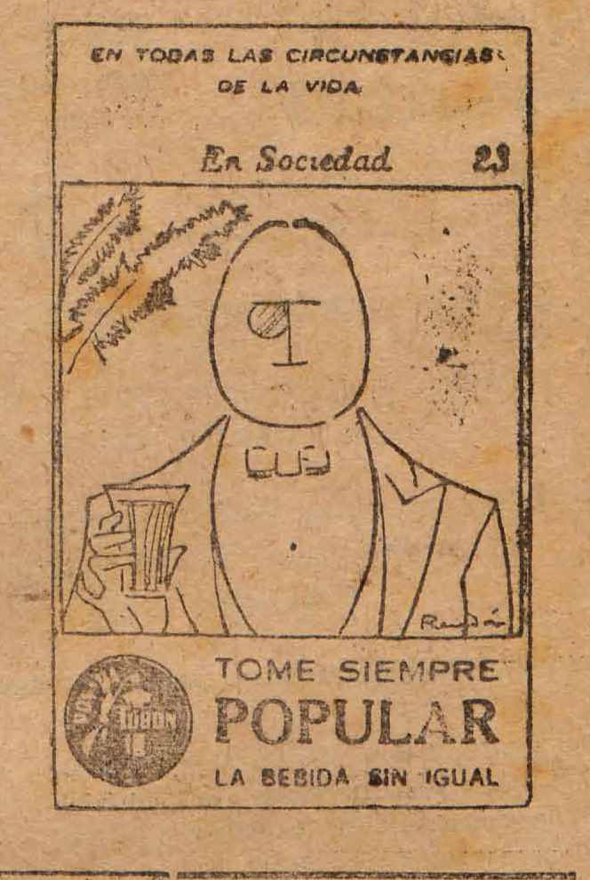 Publicidad